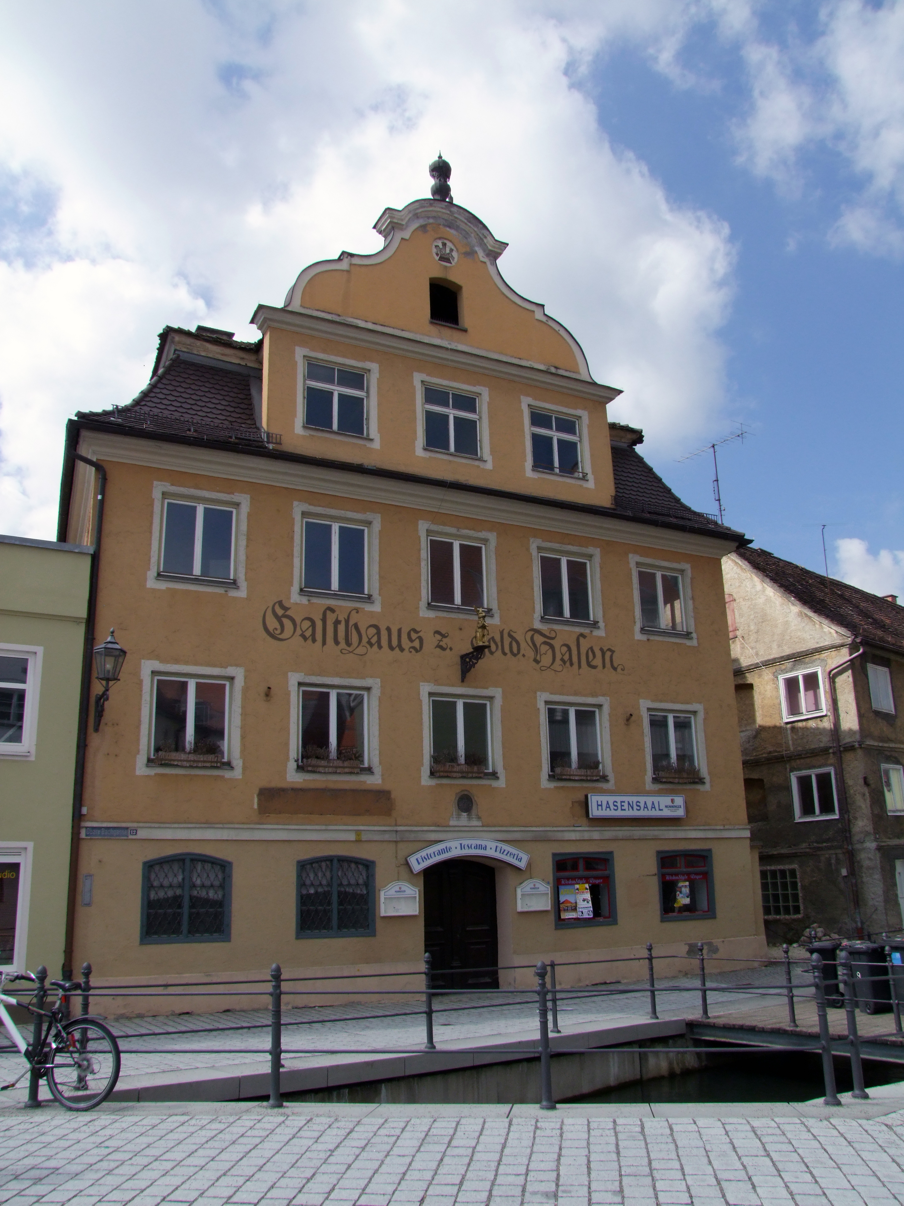 Gasthaus zum Hasen am Schrannenplatz im oberschwäbischen Memmingen.